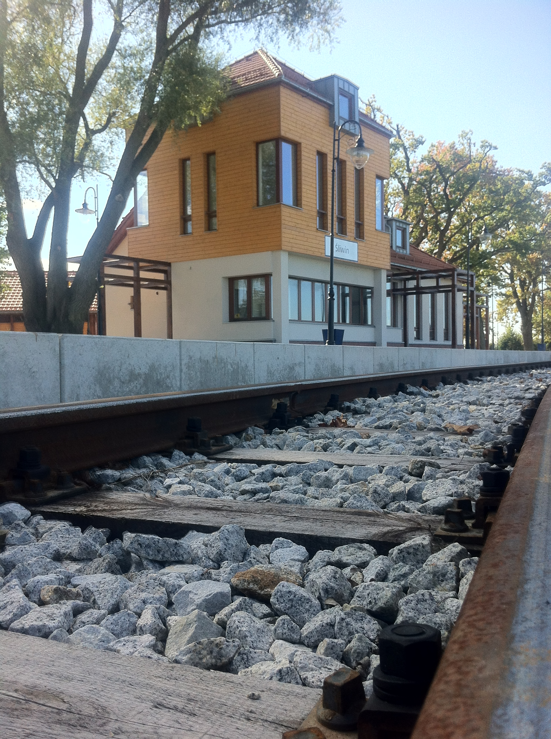 Nadmorska Kolej Wąskotorowa, Stacja Śliwin, 2013